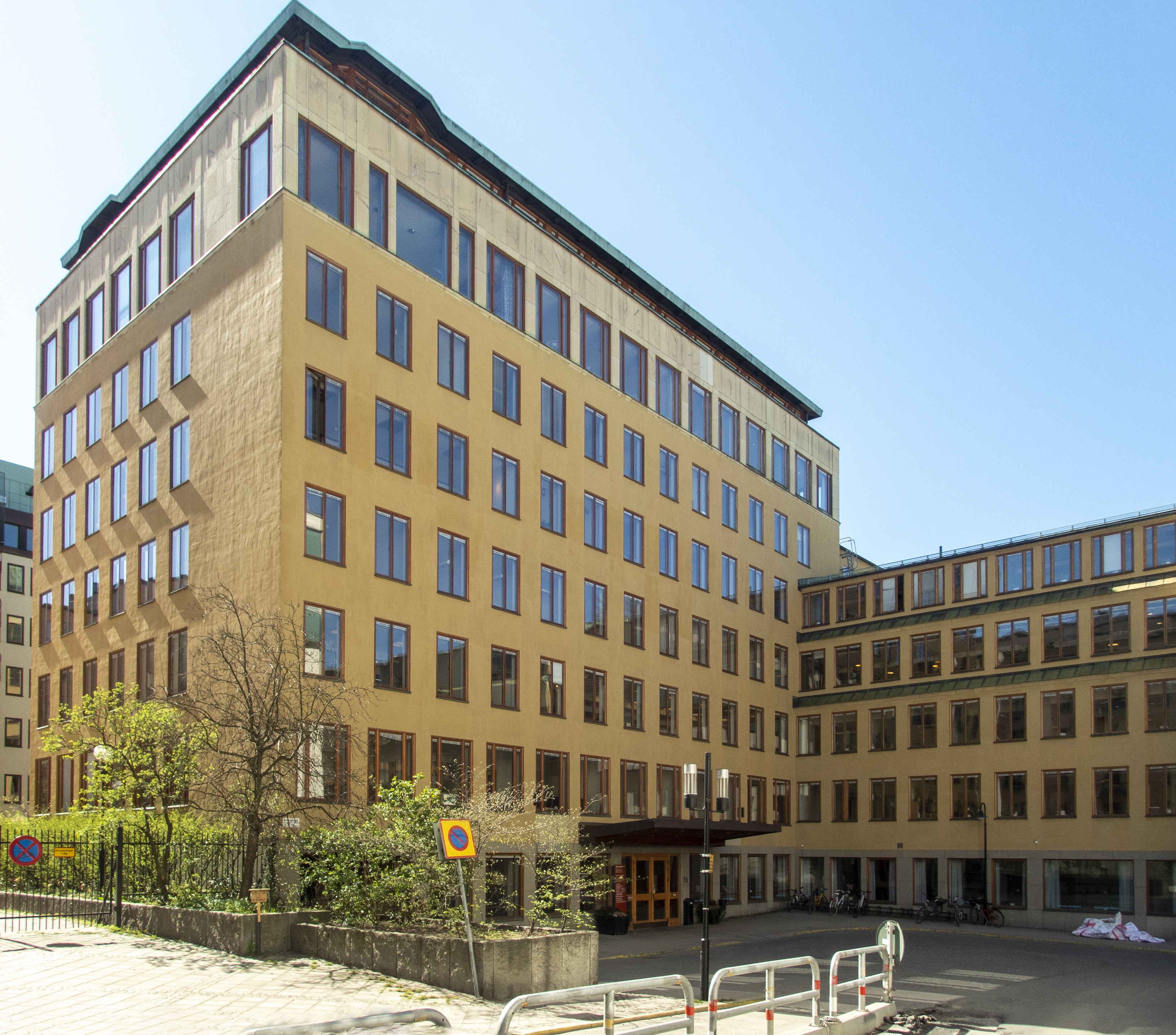 Saturnus 18, Hornsgatan 13 - 19, Ragvaldsgatan 5- 7 Stockholm. Nybyggnadsår 1961-62 Artur von Schmalensee (Arkitekt) Svenska Stadsförbundet (Byggherre) Svenska Vägaktiebolaget (Byggmästare)